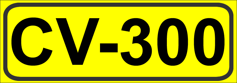 Inidcador de la Carretera de la Comunidad Valenciana CV-300